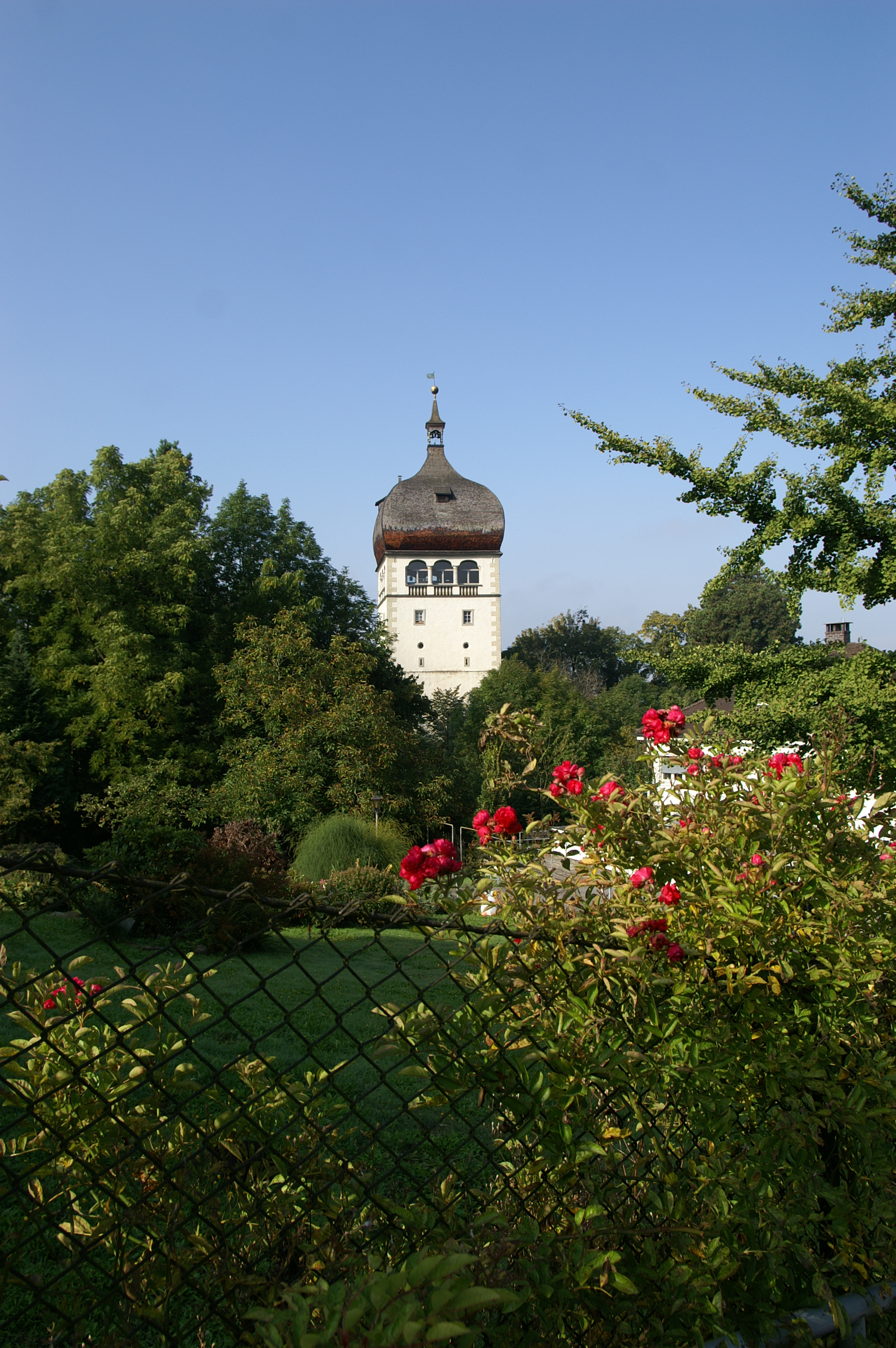 Der Martinsturm, ehemals Getreidespeicher in Bregenz, erbaut 1600. Heute Vorarlberger Militärmuseum.